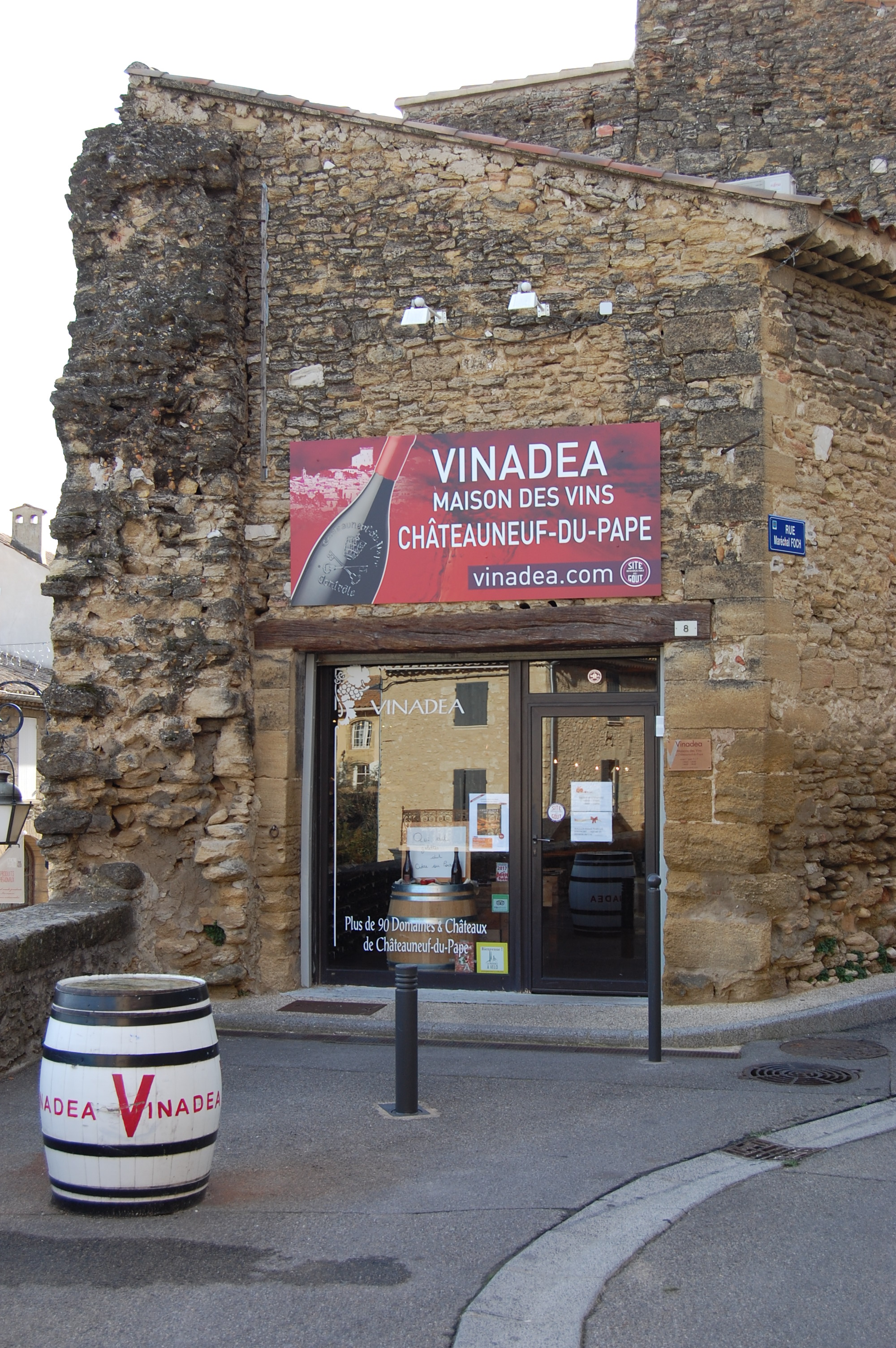 Façade de la Maison des vins de Châteauneuf-du-Pape